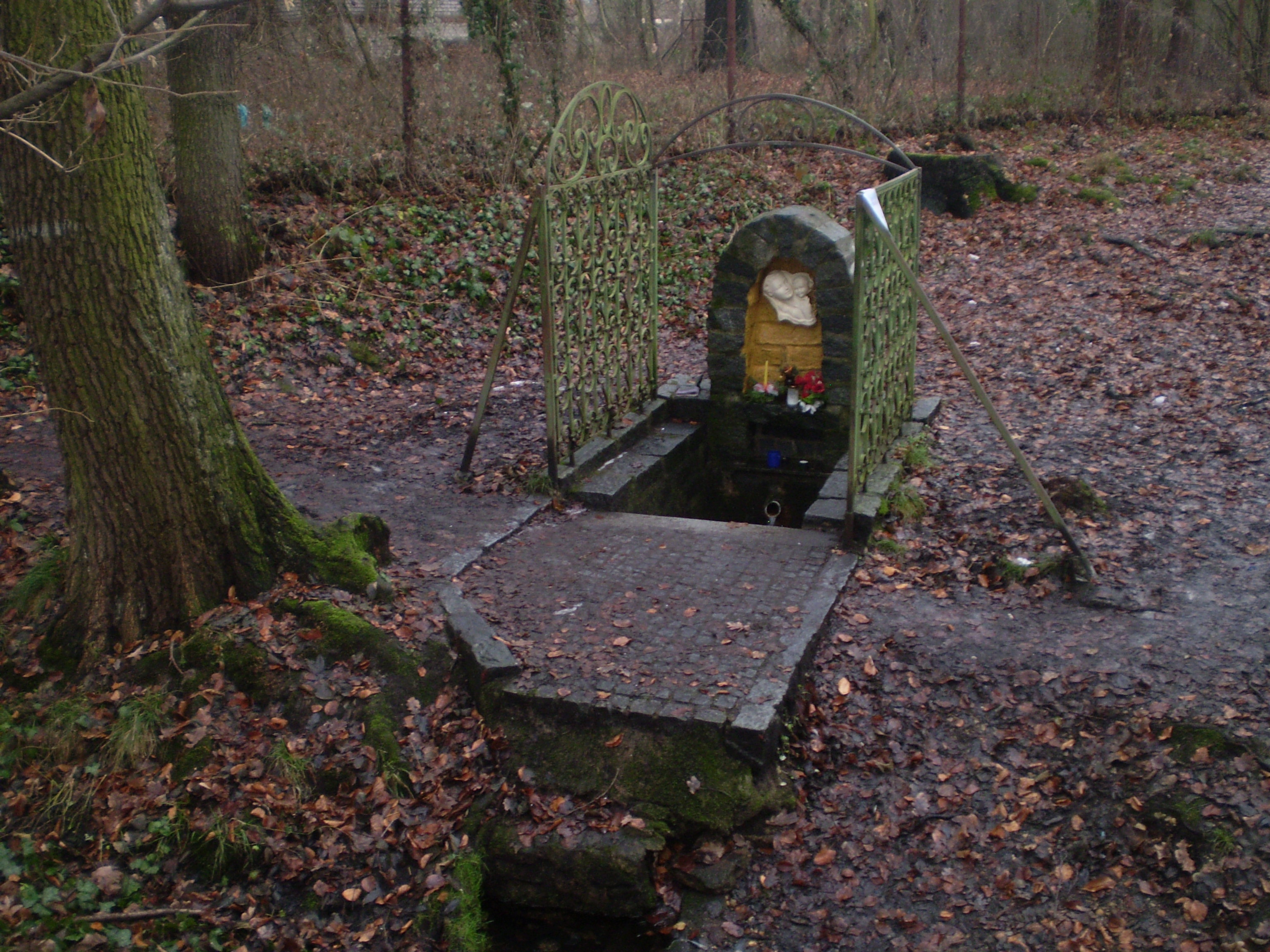 Pramen Lánského potoka